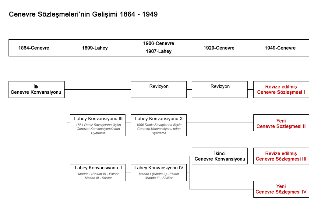 Cenevre Sözleşmeleri'nin gelişim aşamaları Yapan: Farukahmet Kaynak: UW adlı kullanıcının şu çalışması